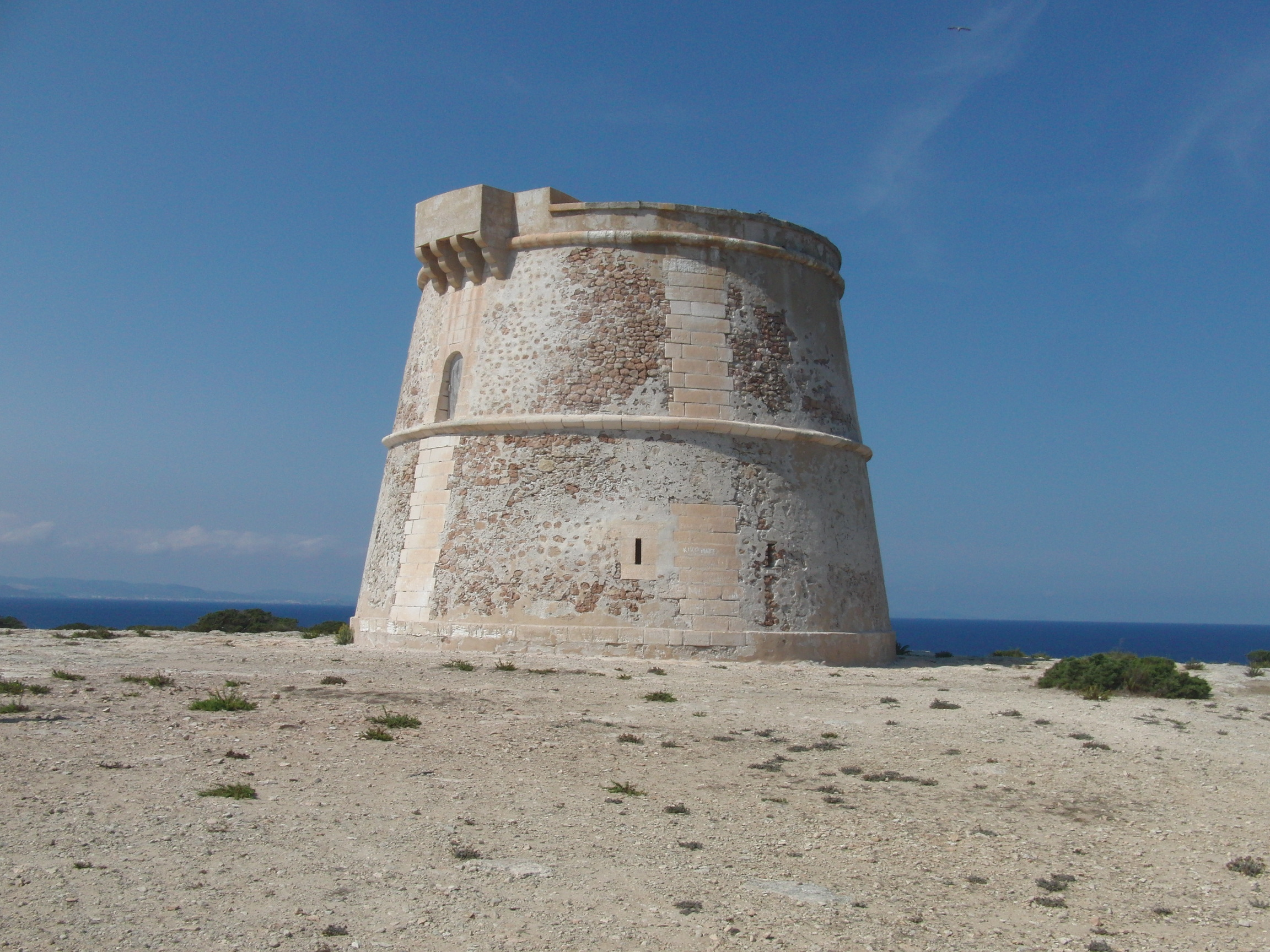 Turm zur Verteidigung Formenteras